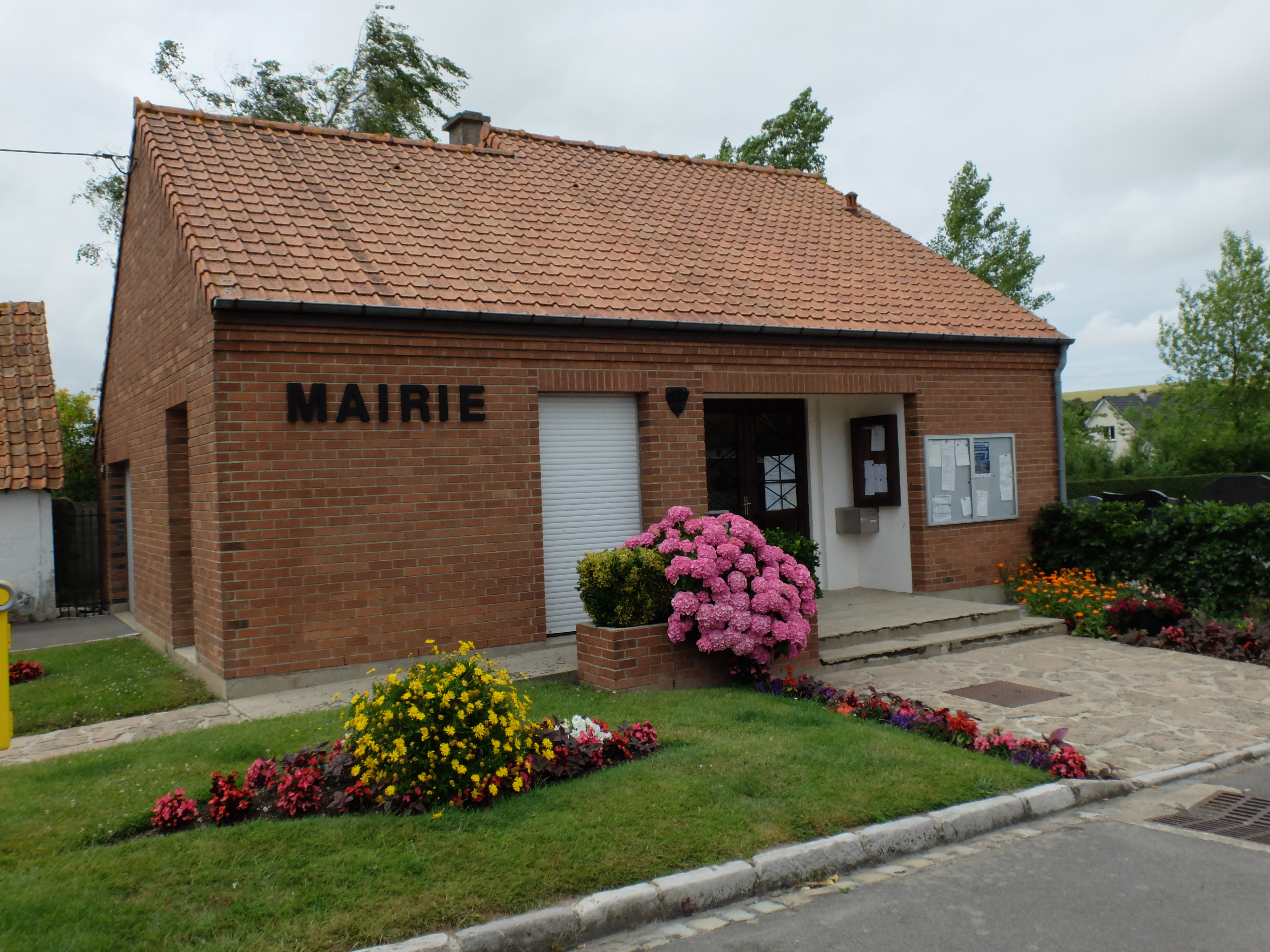 Vue de la mairie d'Hermelinghen.